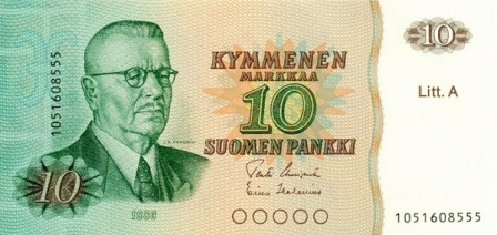 Finnország 10 márka 1980 (Litt.A) - második kiadás Juho Kusti Paasikivi portréjával.